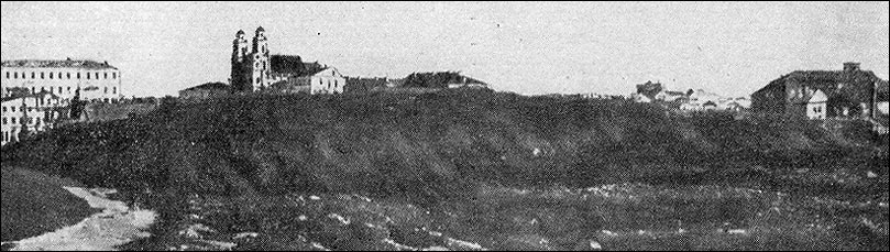 Мінскае замчышча ў XIX ст. (від з поўначы)